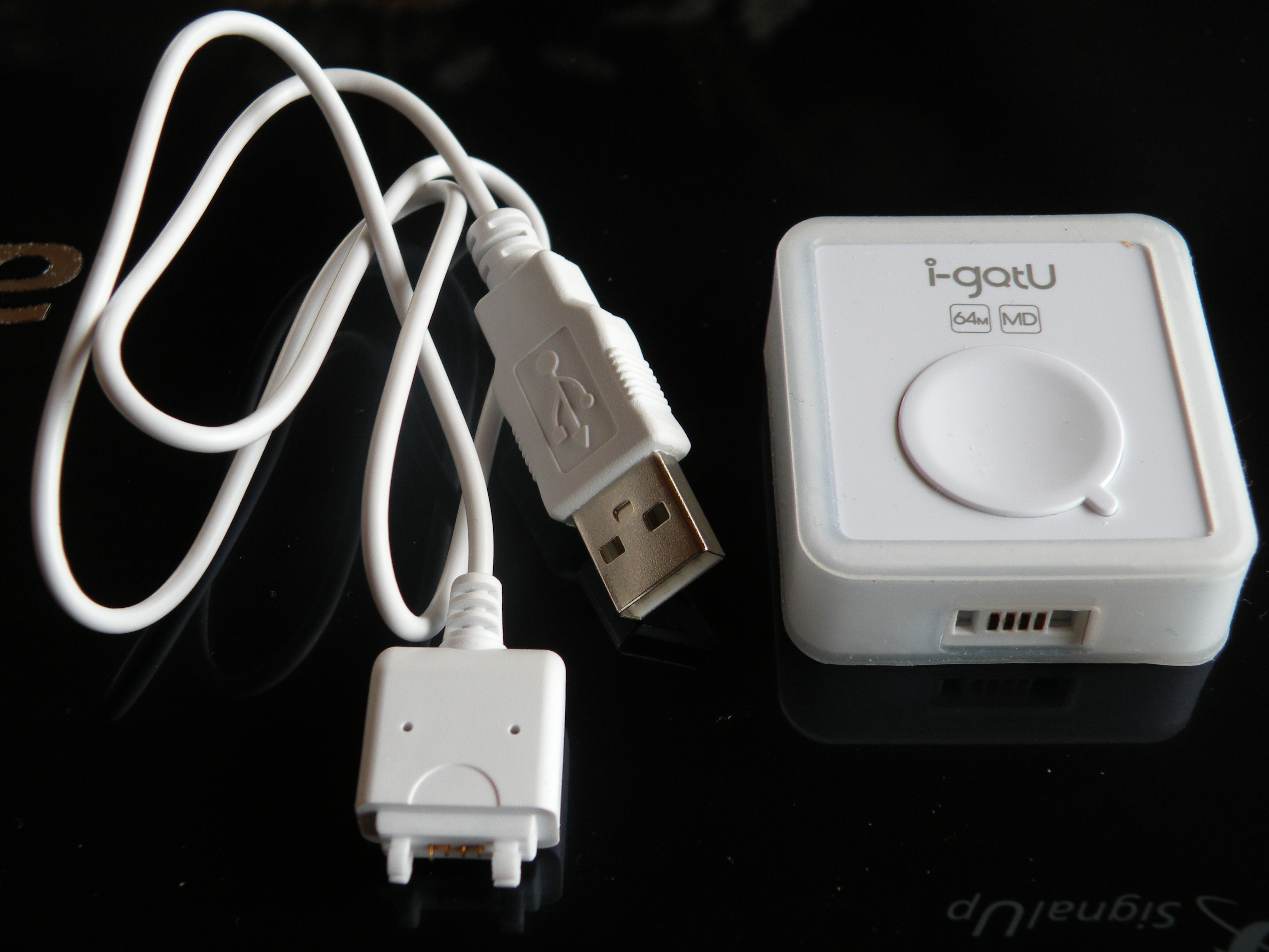 Geotagger, type GT 600, met USB-aansluitingssnoer